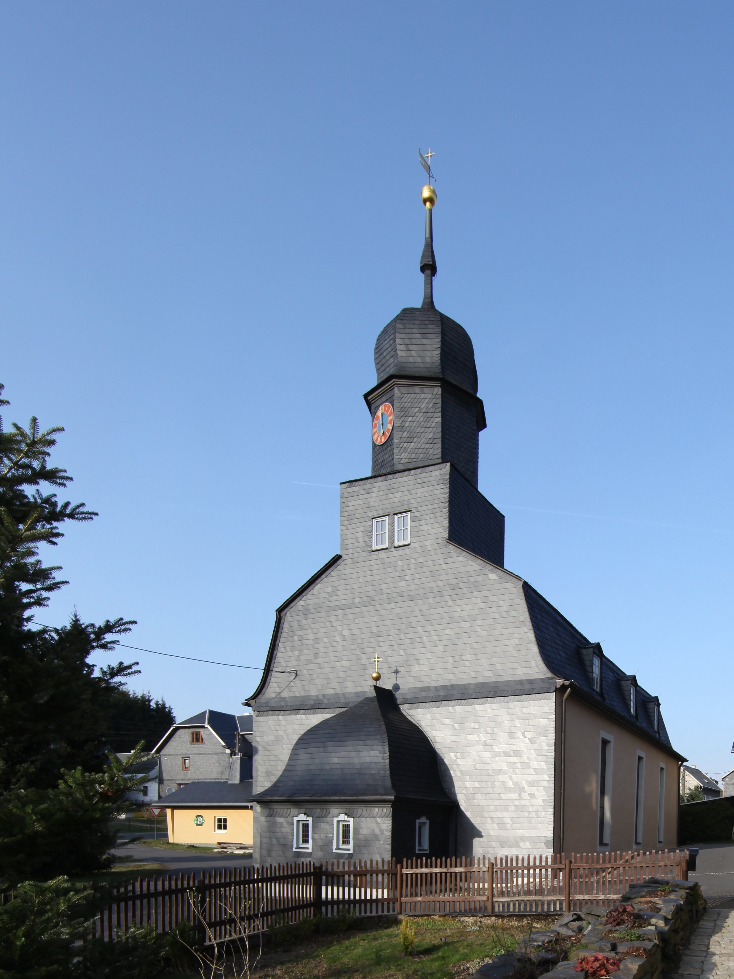 Spechtsbrunn-Matthäuskirche